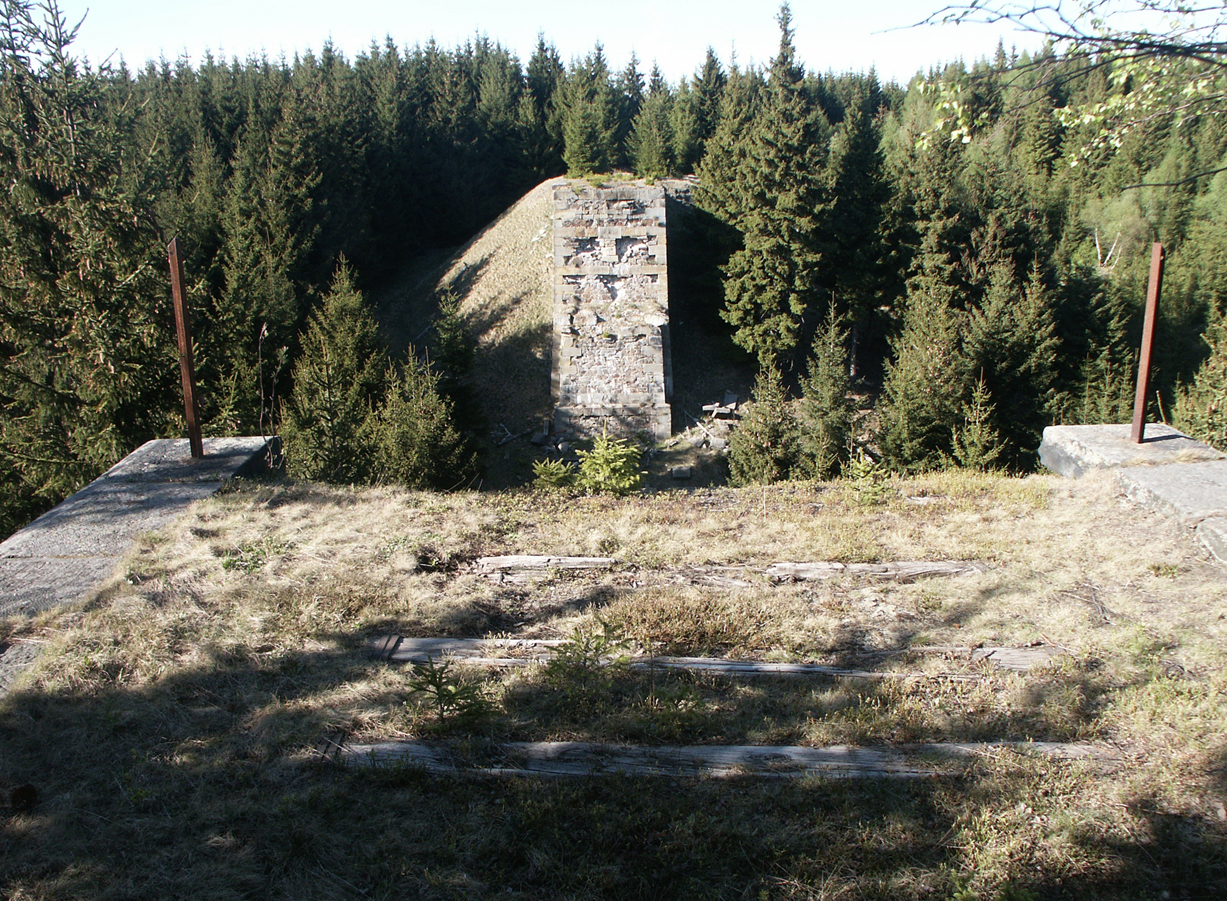 Abolished bridge on railwaz line Krimov- Reitzenhain, km31